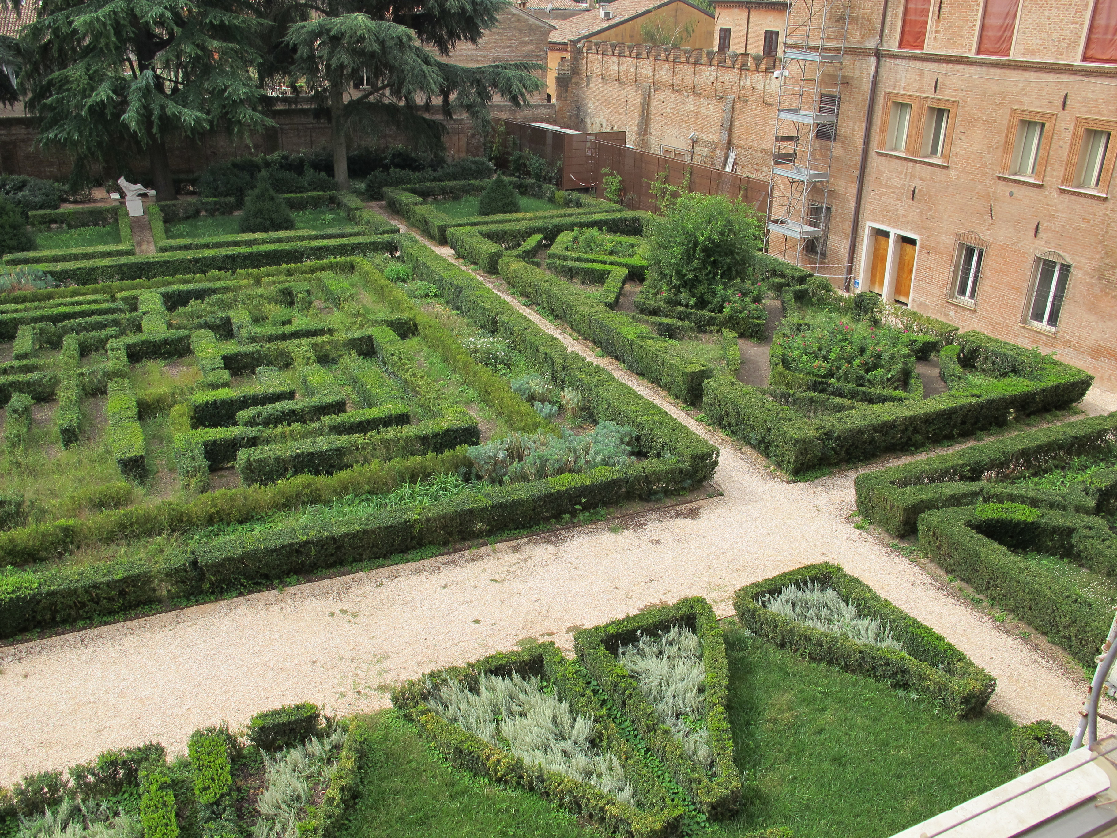 Museo Archeologico Nazionale - MIBAC This is a photo of a monument which is part of cultural heritage of Italy.